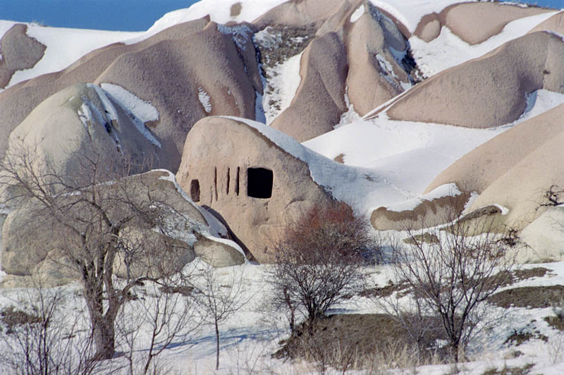 grothuis in pigeon valley